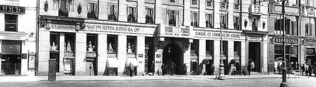 Невский, 44-46. Фрагмент фасада. Панорама. Санкт-Петербург. 1910-е годы